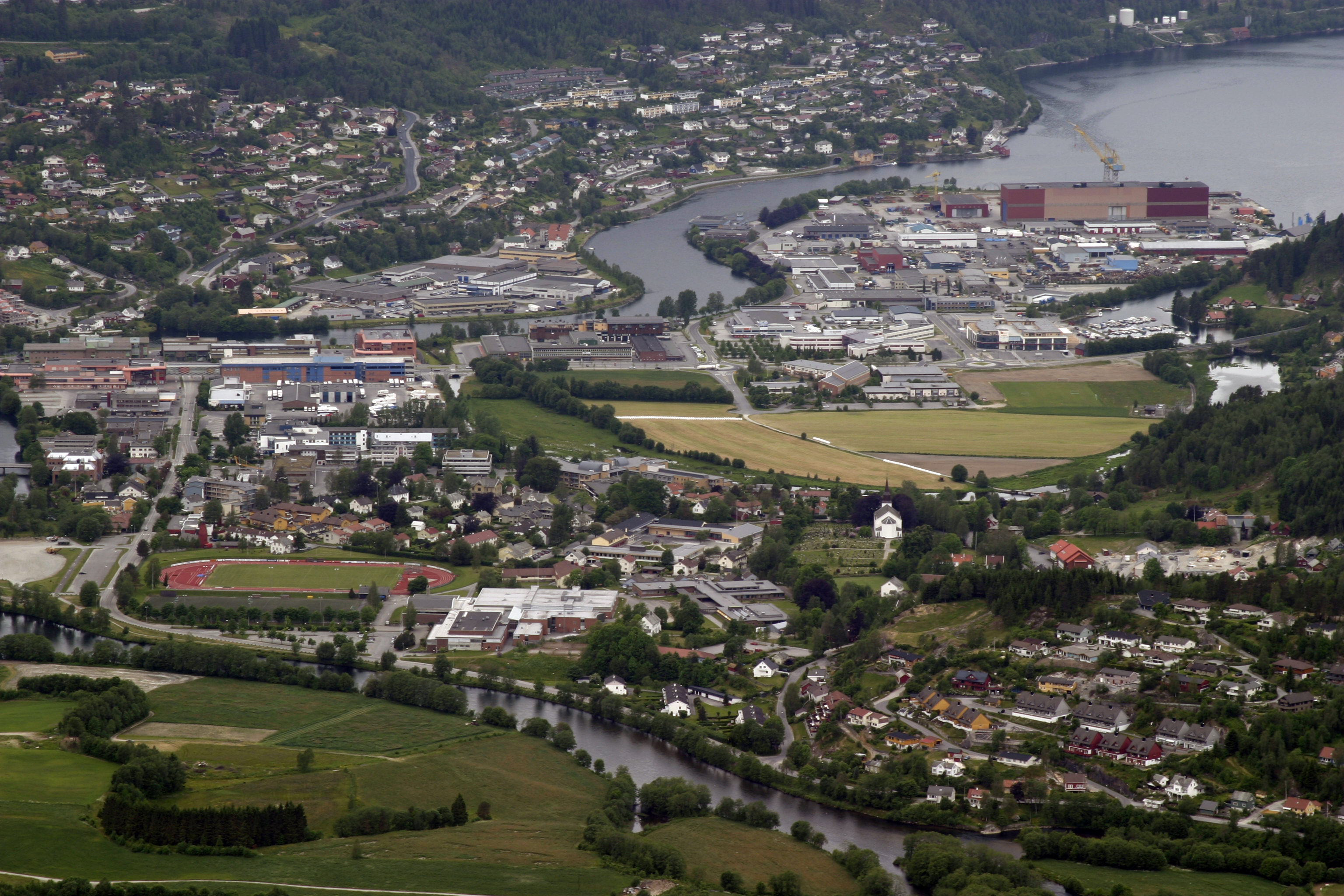 Førde sentrum